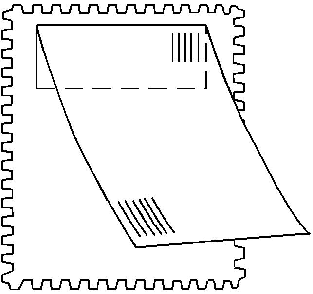 Марочная наклейка (правильное использование)